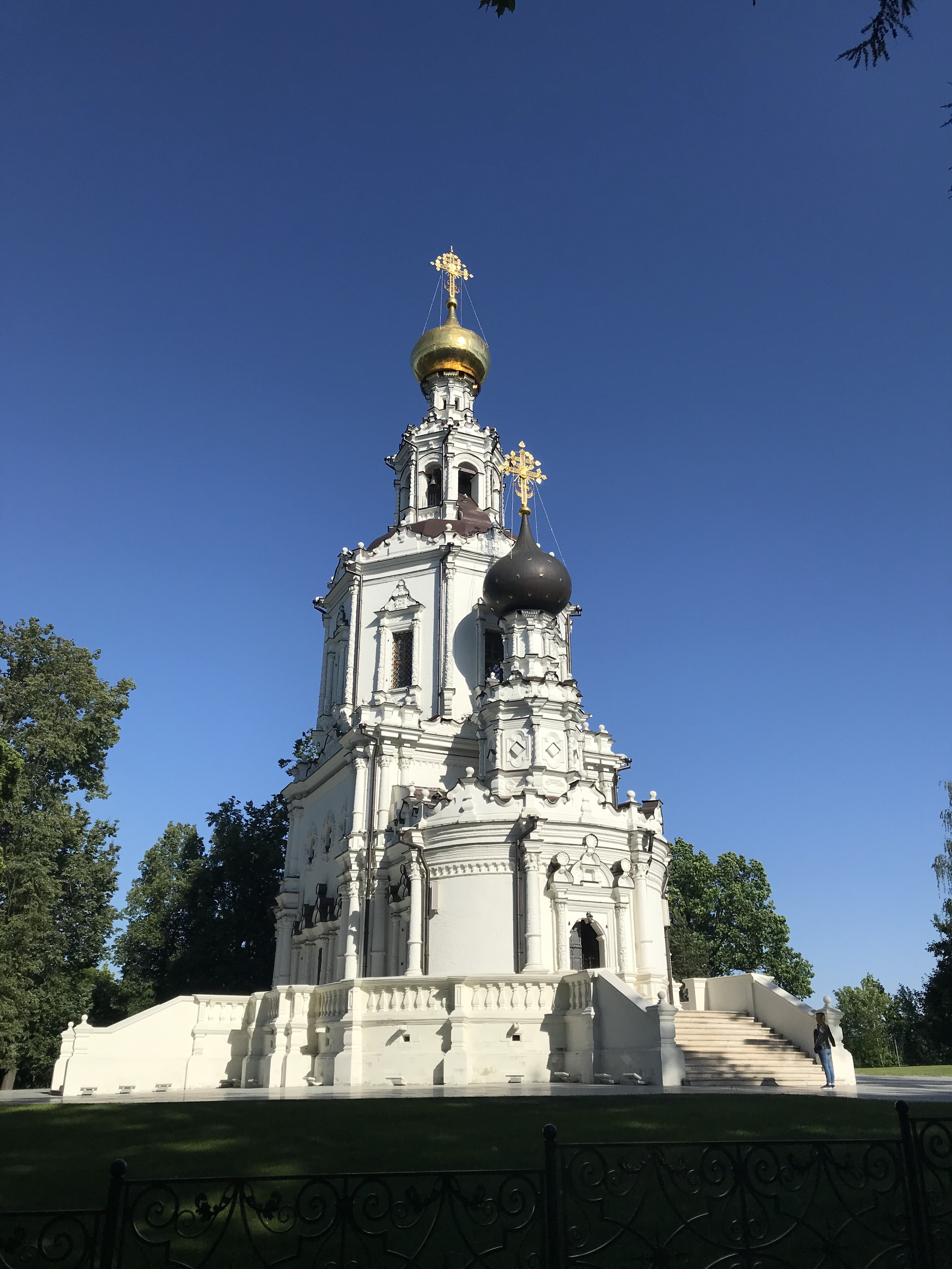 Церковь Троицы в Троице-Лыково: Одинцовская ул., дом 24, строение 1, Строгино, Северо-западный округ, Москва